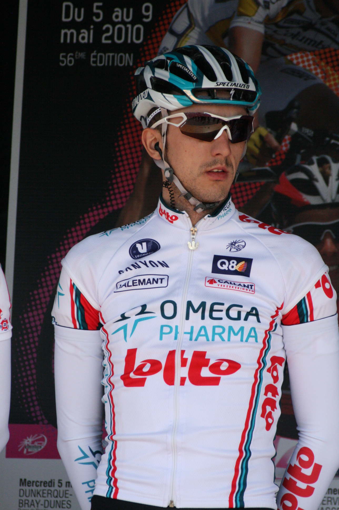 Jelle Vanendert, lors de la présentation des équipes des 4 jours de Dunkerque 2010